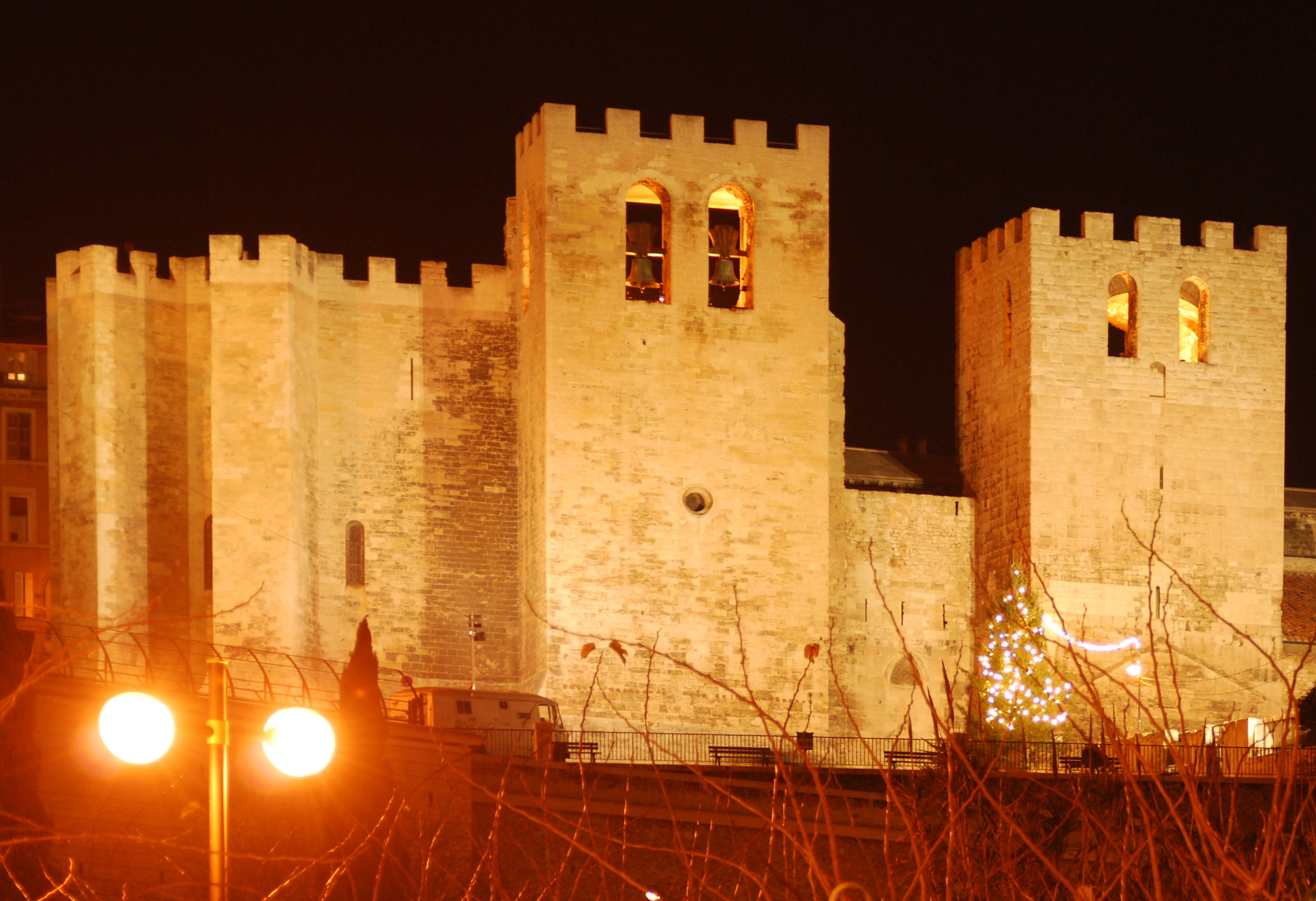 Saint-Victor Marseille 2